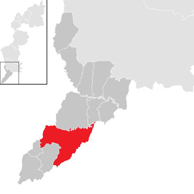 Bezirk Jennersdorf